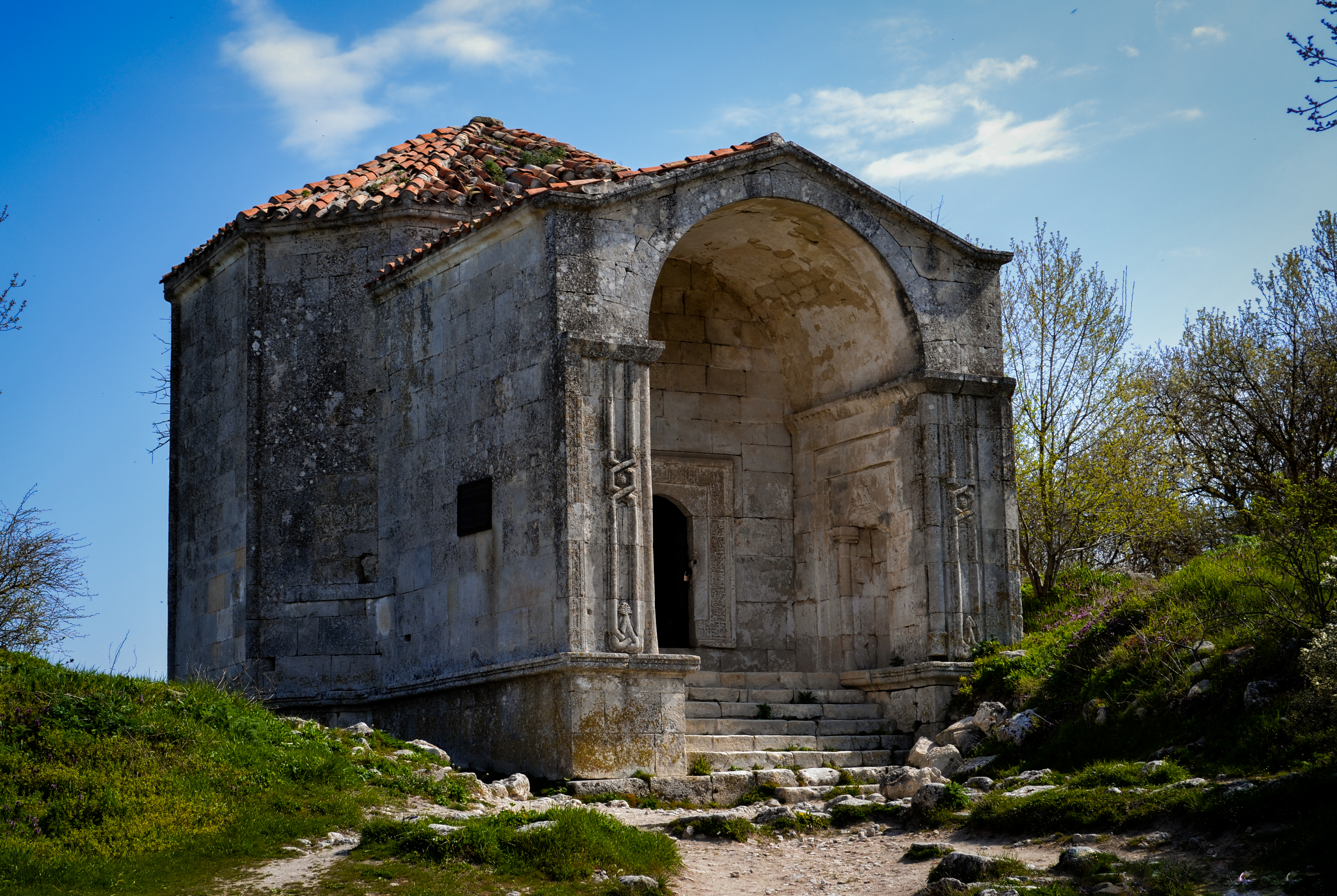 «Бахчисарай», Бахчисарайський р-н, за межами населених пунктів